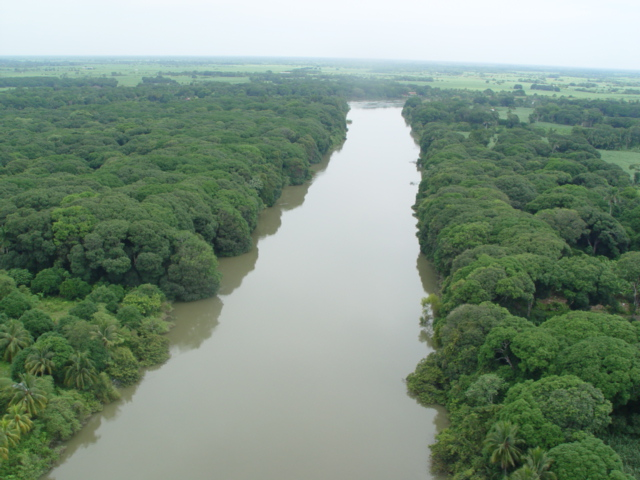 Vista Aerea del Rio de Papaloapan, Cosamaloapan, Ver.